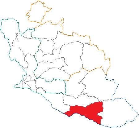 Situation du canton dans le département de Vaucluse (France)